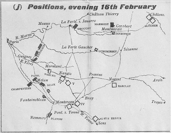 Stellung der Truppen im Winterfeldzug 1814 in Frankreich am 16.2.1814 abends